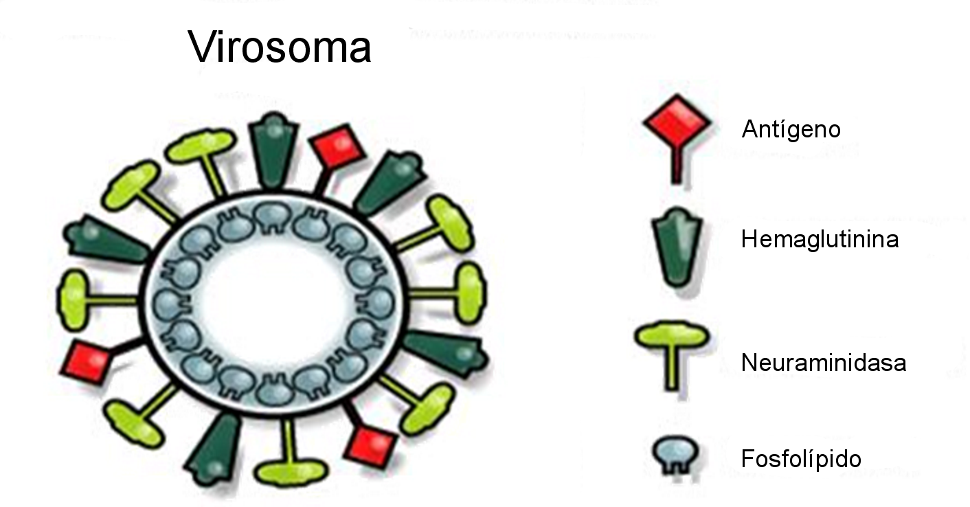 Esquema en el que se representa la estructura de un virosoma diseñado para la vacuna antigripal.